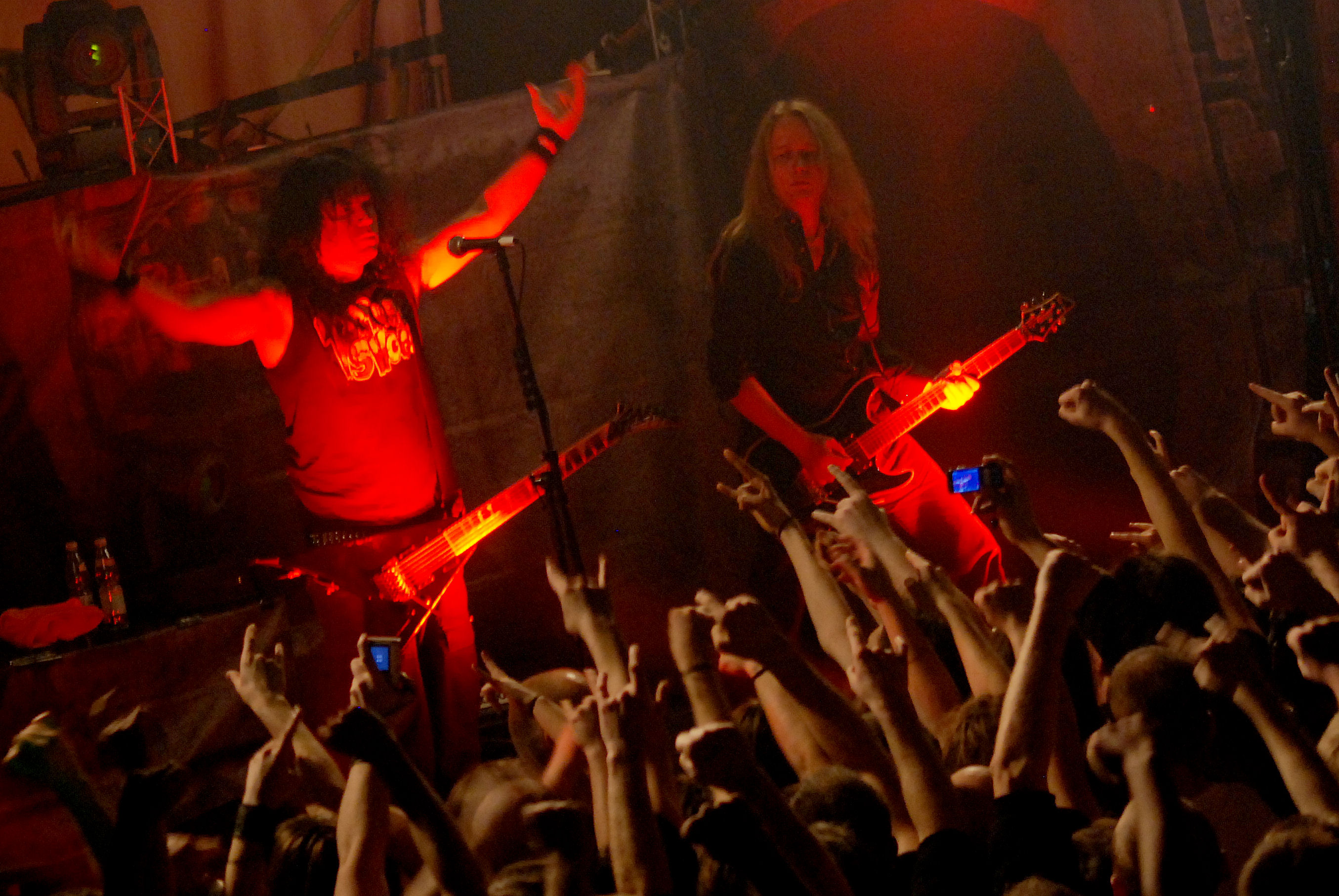 Kreator podczas koncertu w Klubie Studio w Krakowie